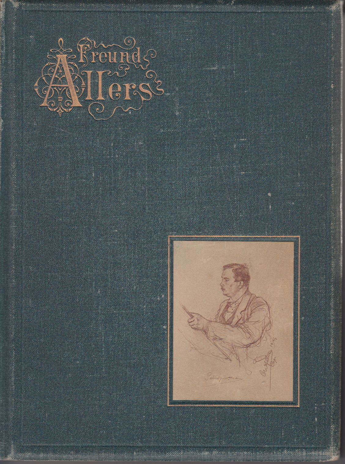 Vorderer Buchdeckel, Leinen, Titelbild des Buches "Freund Allers" von Alexander Olinda